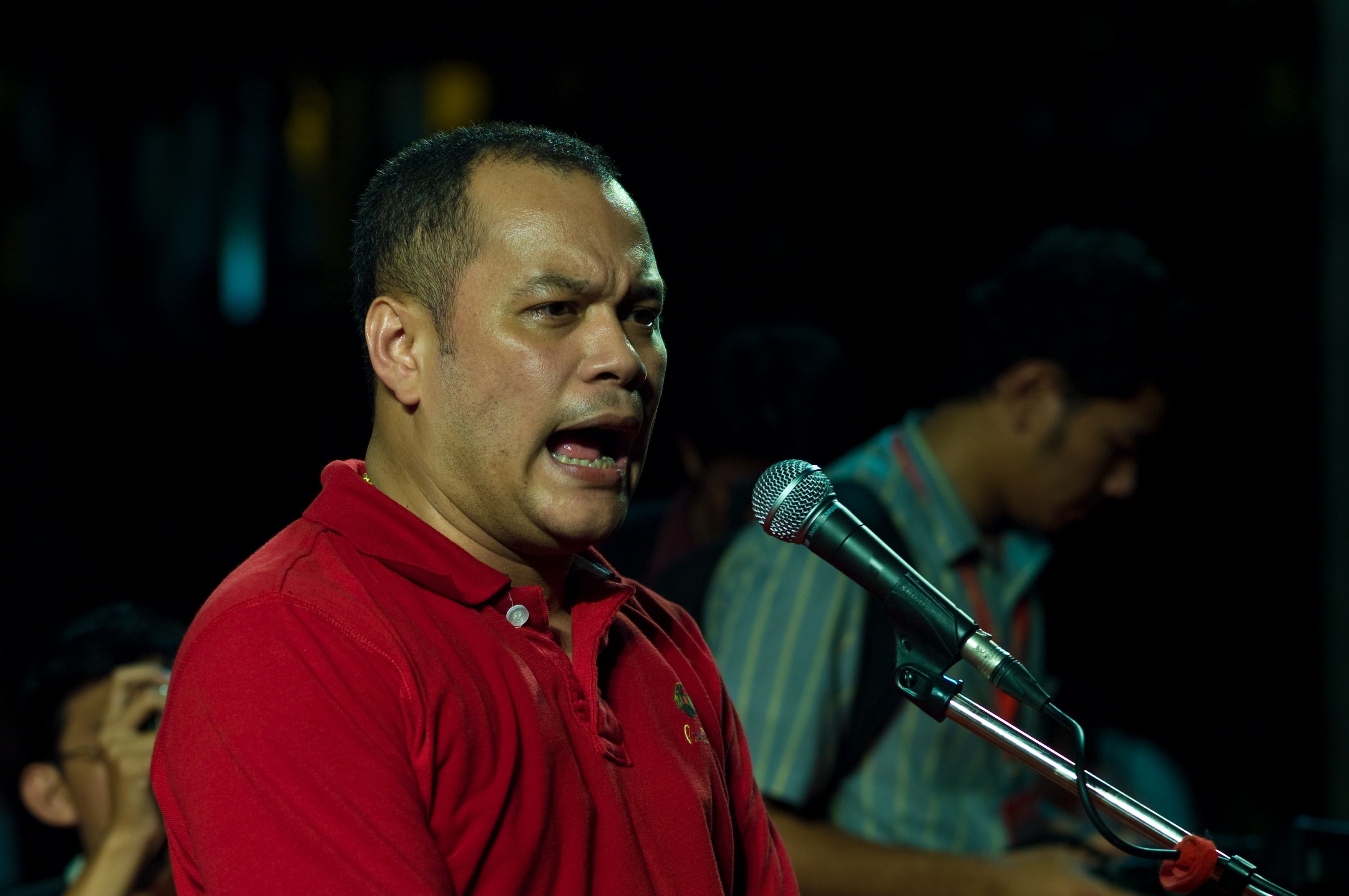 L1001030